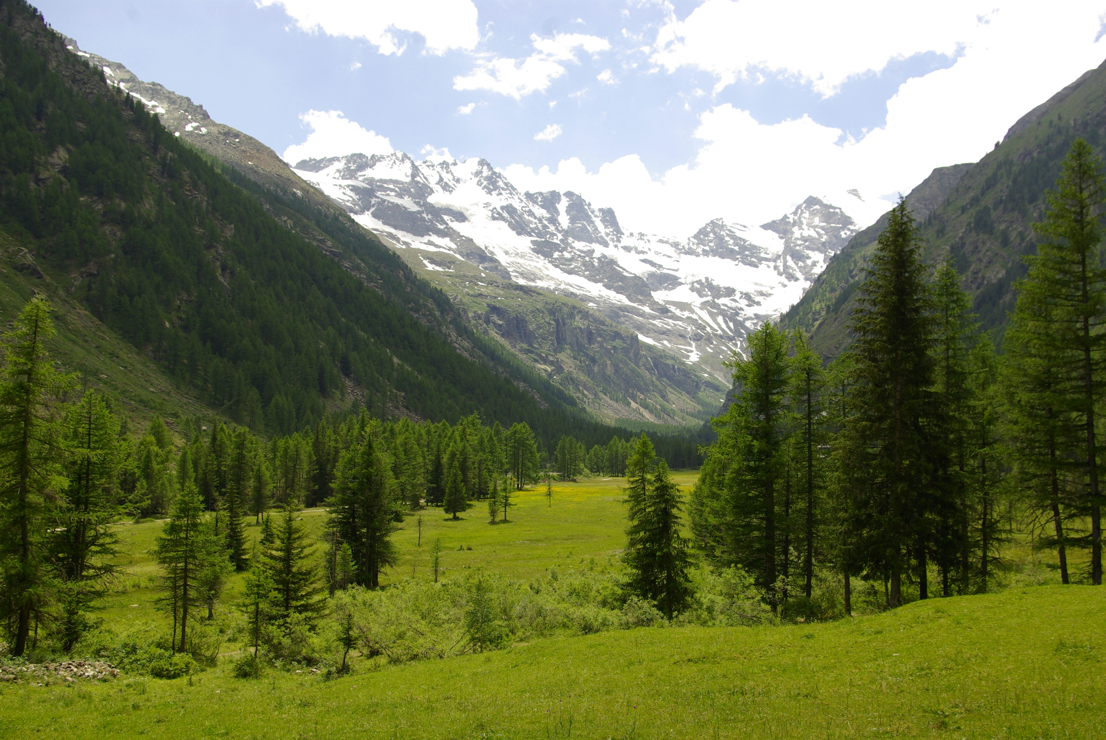 Panorma della valle verso il gruppo del Gran Paradiso, oltre l'abitato di Valnontey Parco nazionale del Gran Paradiso